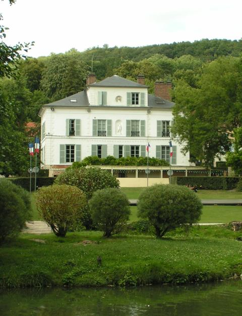 Description: mairie de Gif-sur-Yvette Source: photo prise par Christophe Jacquet le 14 juillet 2004 Licence: Christophe Jacquet, 2004